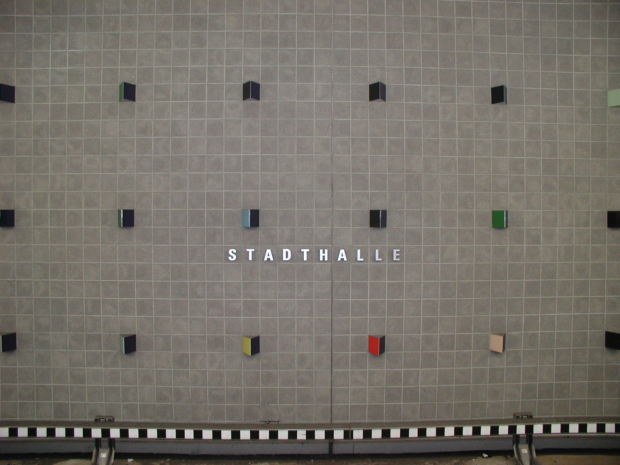 U-Bahnhof Fürth Stadthalle